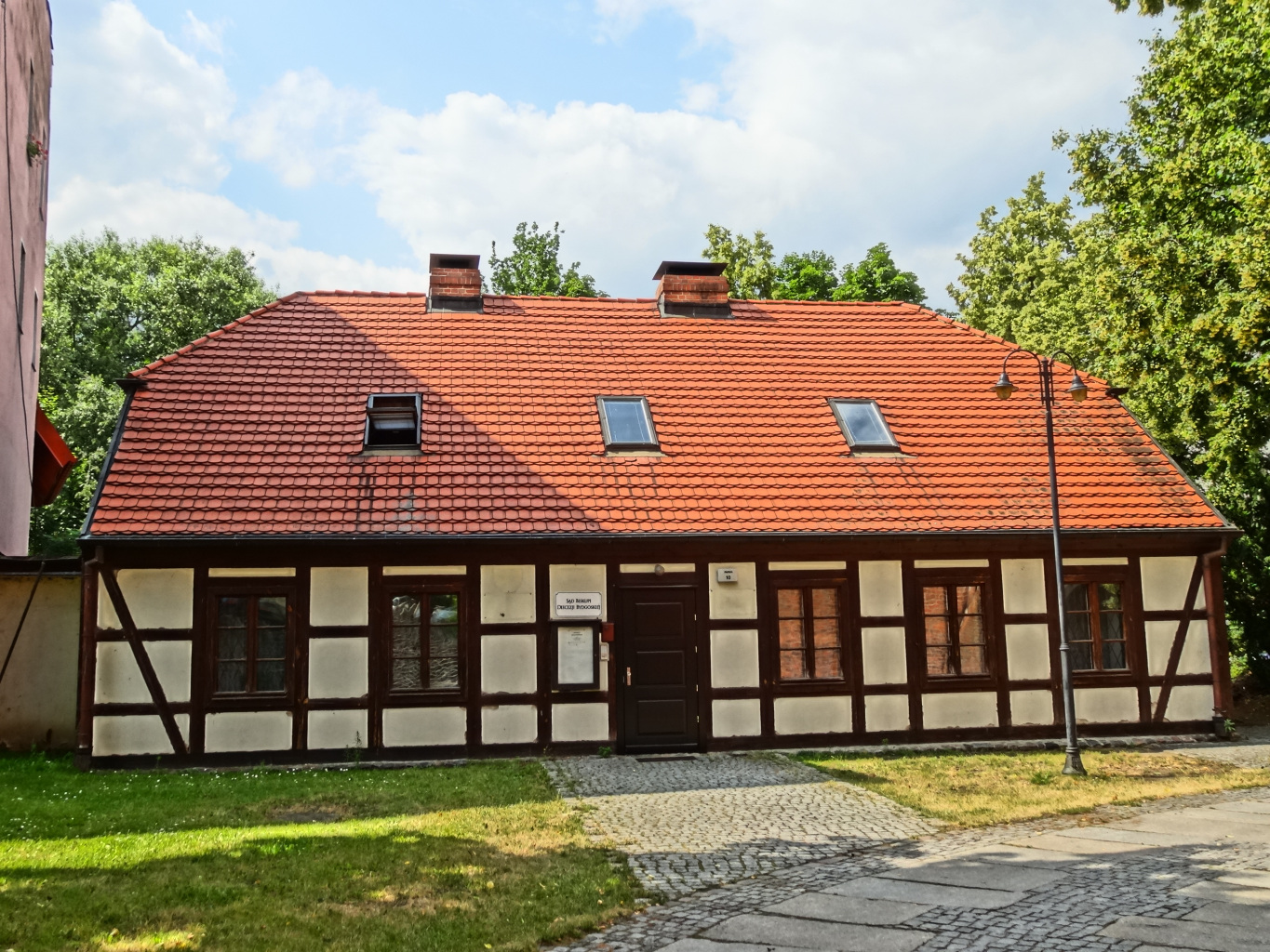 Budynek dawnej szkoły parafialnej w Bydgoszczy ul. Farna 10, zabytek wpisany do rejestru województwa kujawsko-pomorskiego